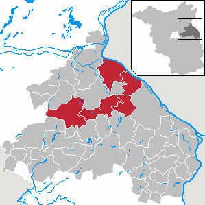 Amt Barnim-Oderbruch in Brandenburg (Country) - District Märkisch-Oderland